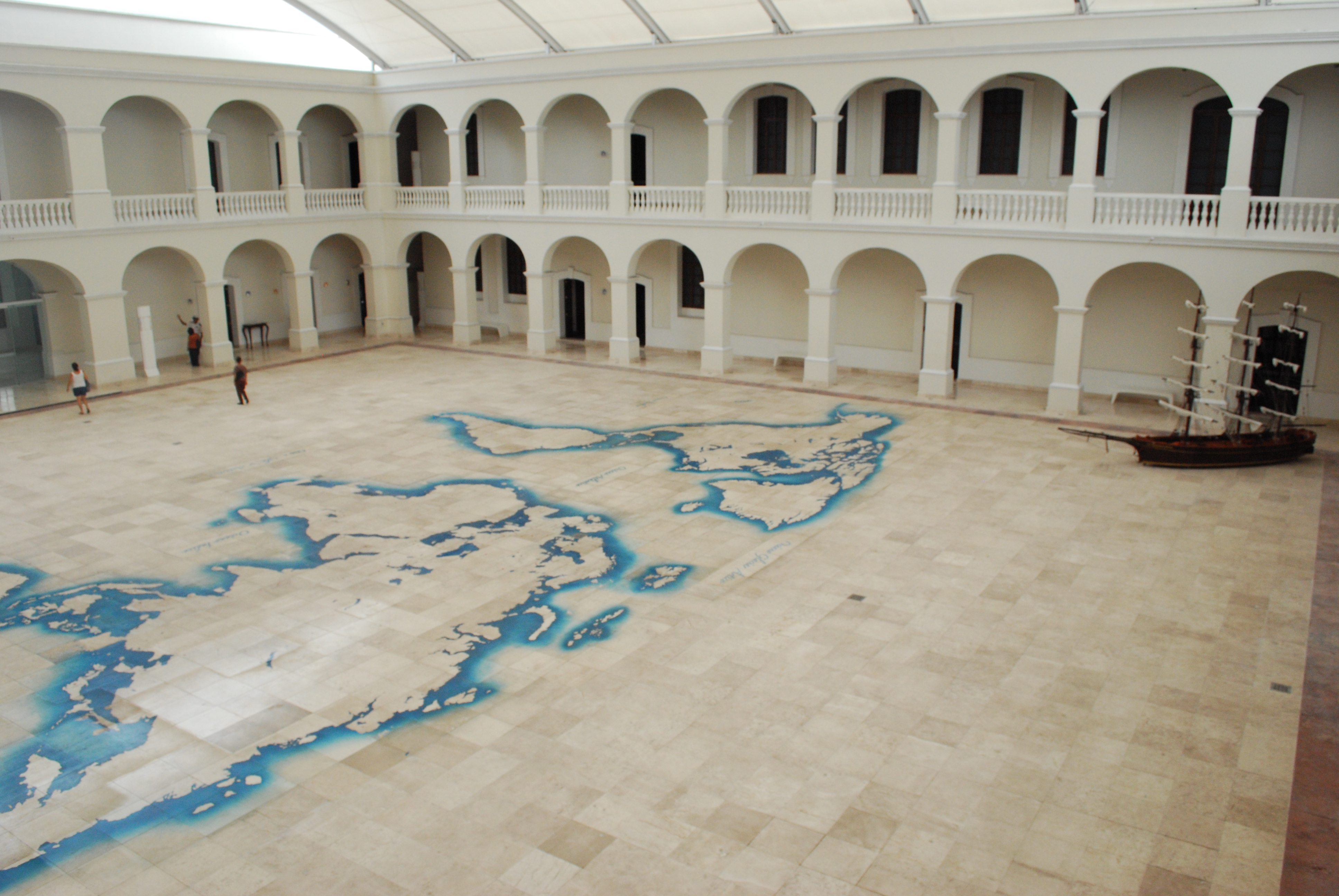 Patio interior del Museo Naval Mexicano, antes sede de la Escuela Naval en Veracruz